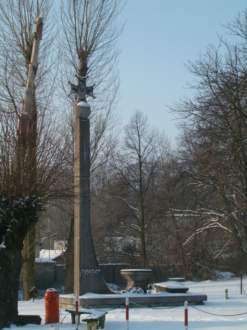 Polska, woj. wielkopolskie, Dobrzyca, Pomnik poległym w walce o niepodległość i obronę ojczyzny u zbiegu ulic Koźmińskiej i Parkowej.